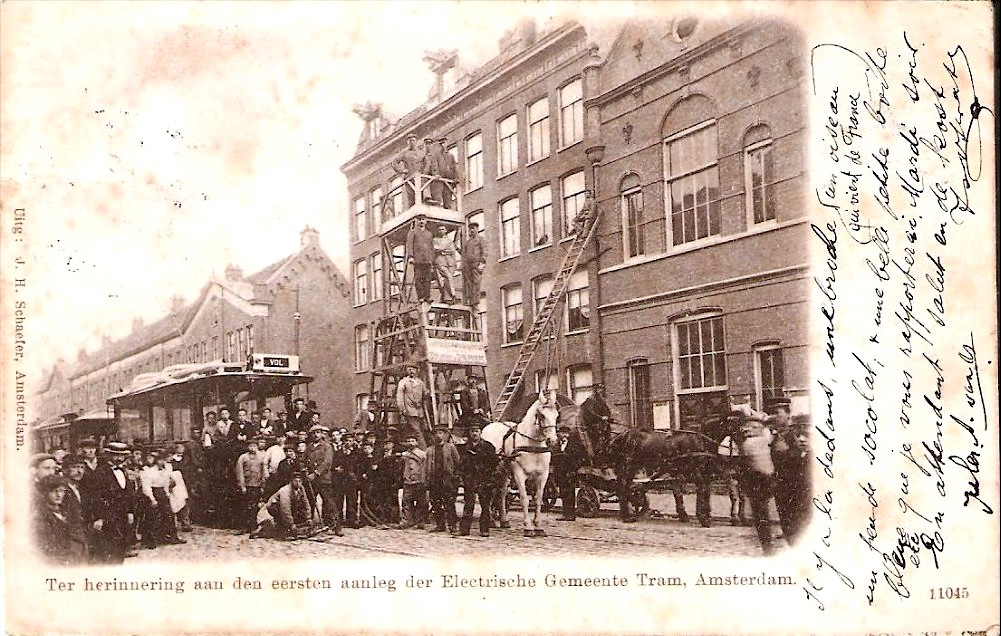 Old postcard of Amsterdam. Marnixstraat, elektrificatie tramlijn Leidseplein - Haarlemmerplein.